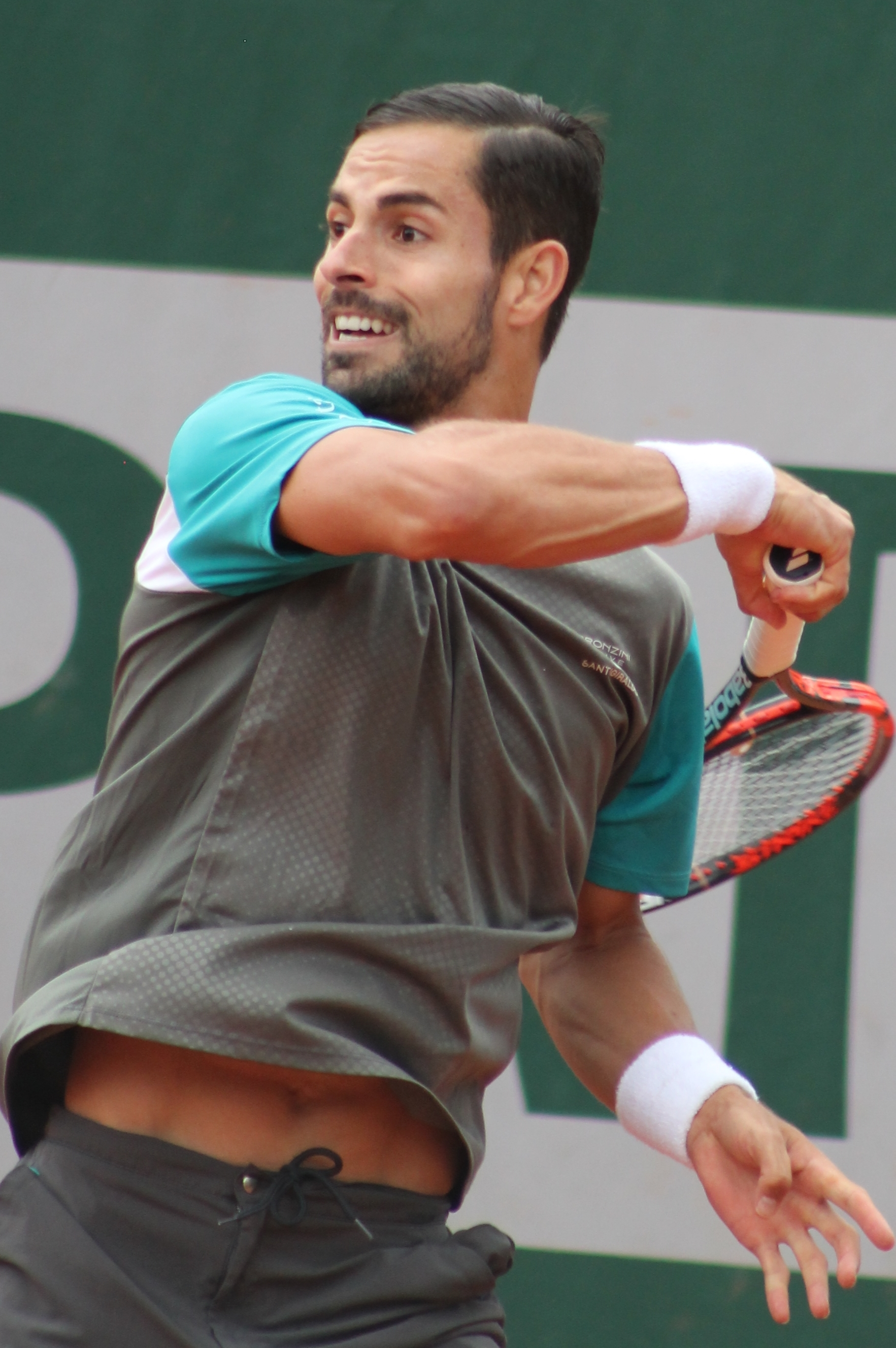 Giraldo RG15 (19)